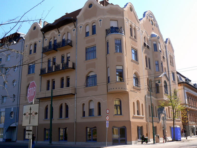 Móricz-ház, Szeged, Szent Mihály u. 9. Tervezte: Raichle J. Ferenc 1909-1910